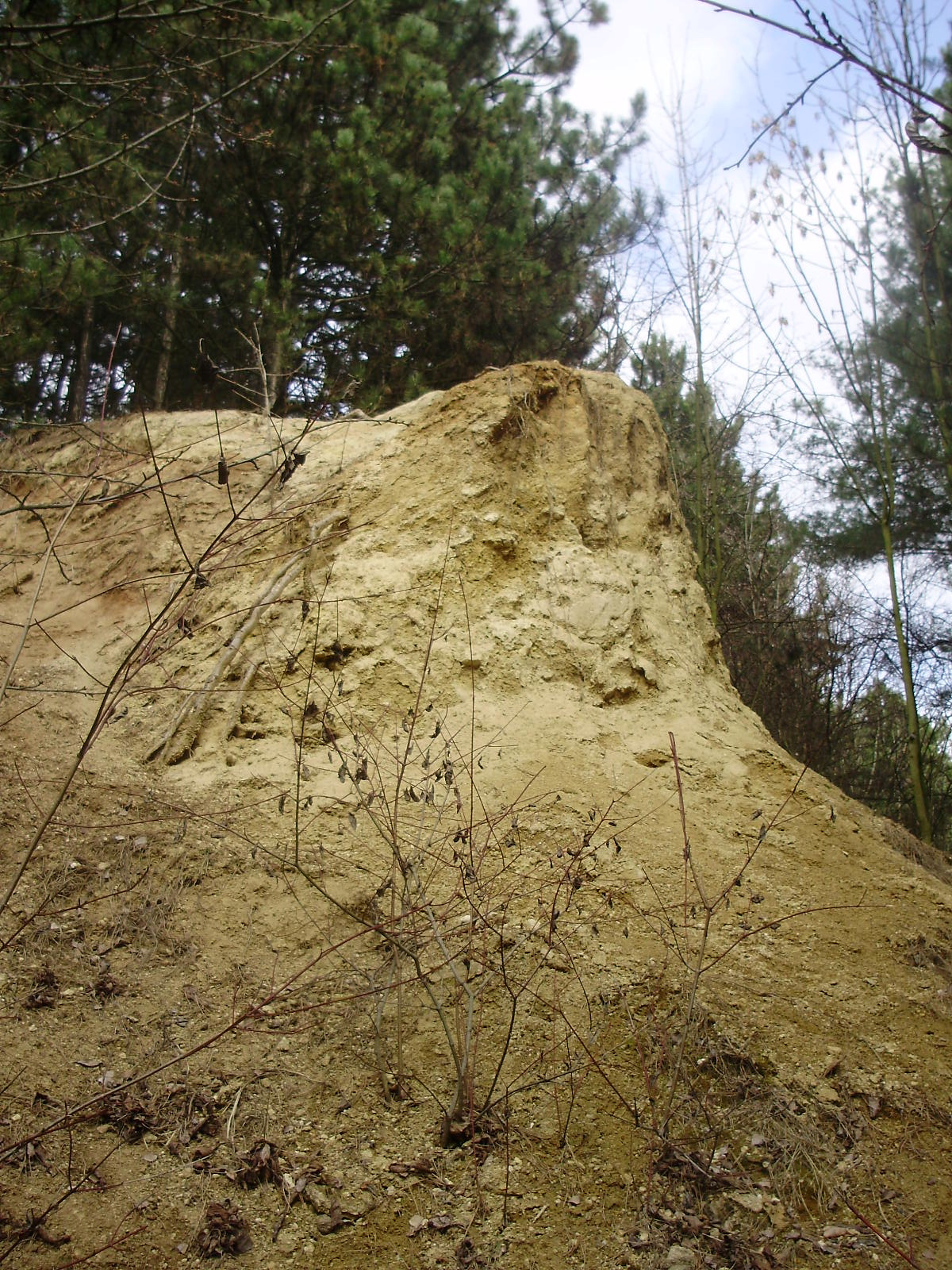 Přírodní památka Mrazový klín- (Vyškov- Czech Republic)